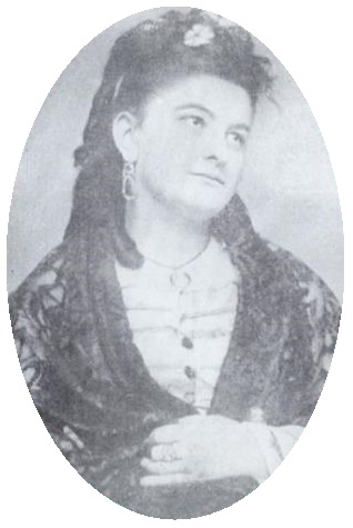 Emilia Pardo Bazán, óvalo